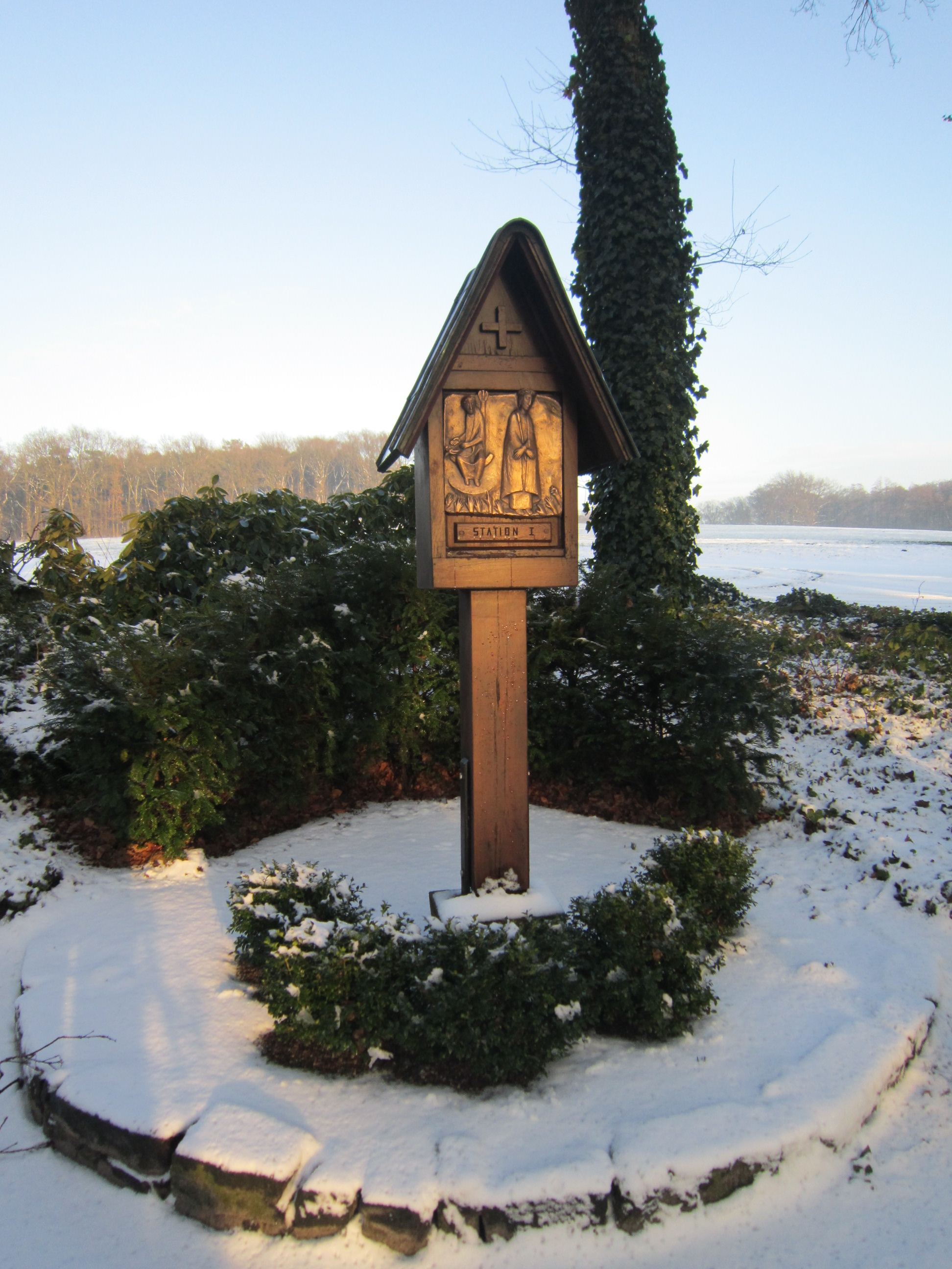 Station I des Kreuzwegs bei der Kapelle St. Anna Klus in Südlohne (Stadt Lohne, Landkreis Vechta, Niedersachsen)